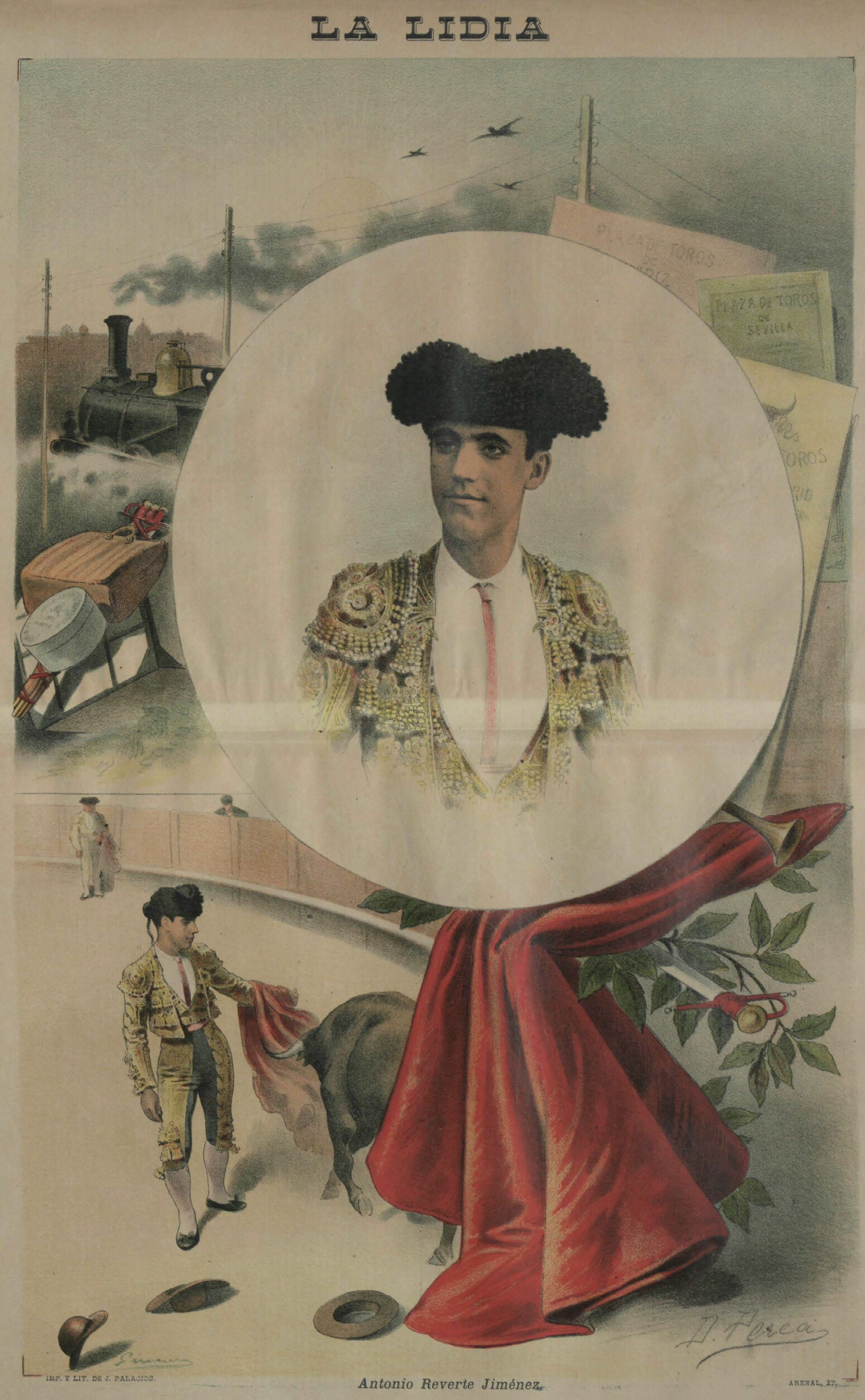 Antonio Reverte Jiménez. Litografía por dibujo de Daniel Perea. La Lidia, 7 de septiembre de 1891